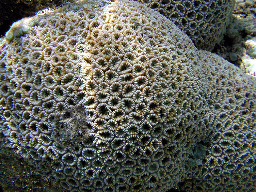 Dipsastraea matthaii, colonias en Samoa Americana NP